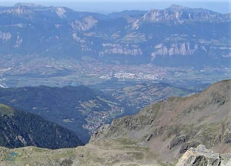 Vue sur la vallée Grenobloise depuis le sommet de la Croix de Belledonne, au fond le massif de Chartreuse 2005. Cevenol2